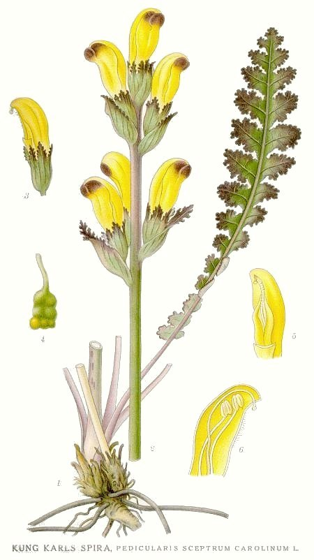 Original Description Kung Karls spira, Pedicularis sceptrum-carolinum L.